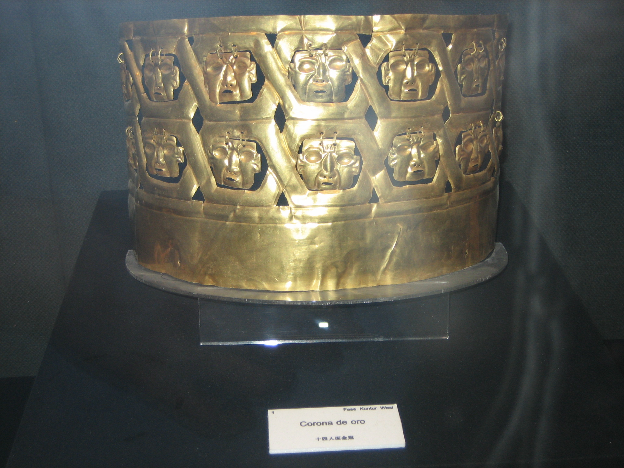 goldene Krone, gefunden in Kuntur Wasi